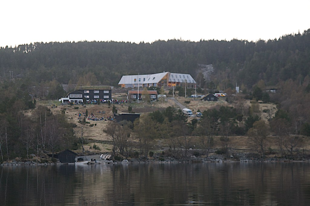 Preikestolhytta er en turistforeningshytte som ligger i Strand kommune. Den ble bygget i 1949, og et nytt bygg ble åpnet den 18. november 2008 og eies av Stavanger Turistforening (STF). Hytta er naturlig startpunkt for turer til mellom annet Preikestolen.